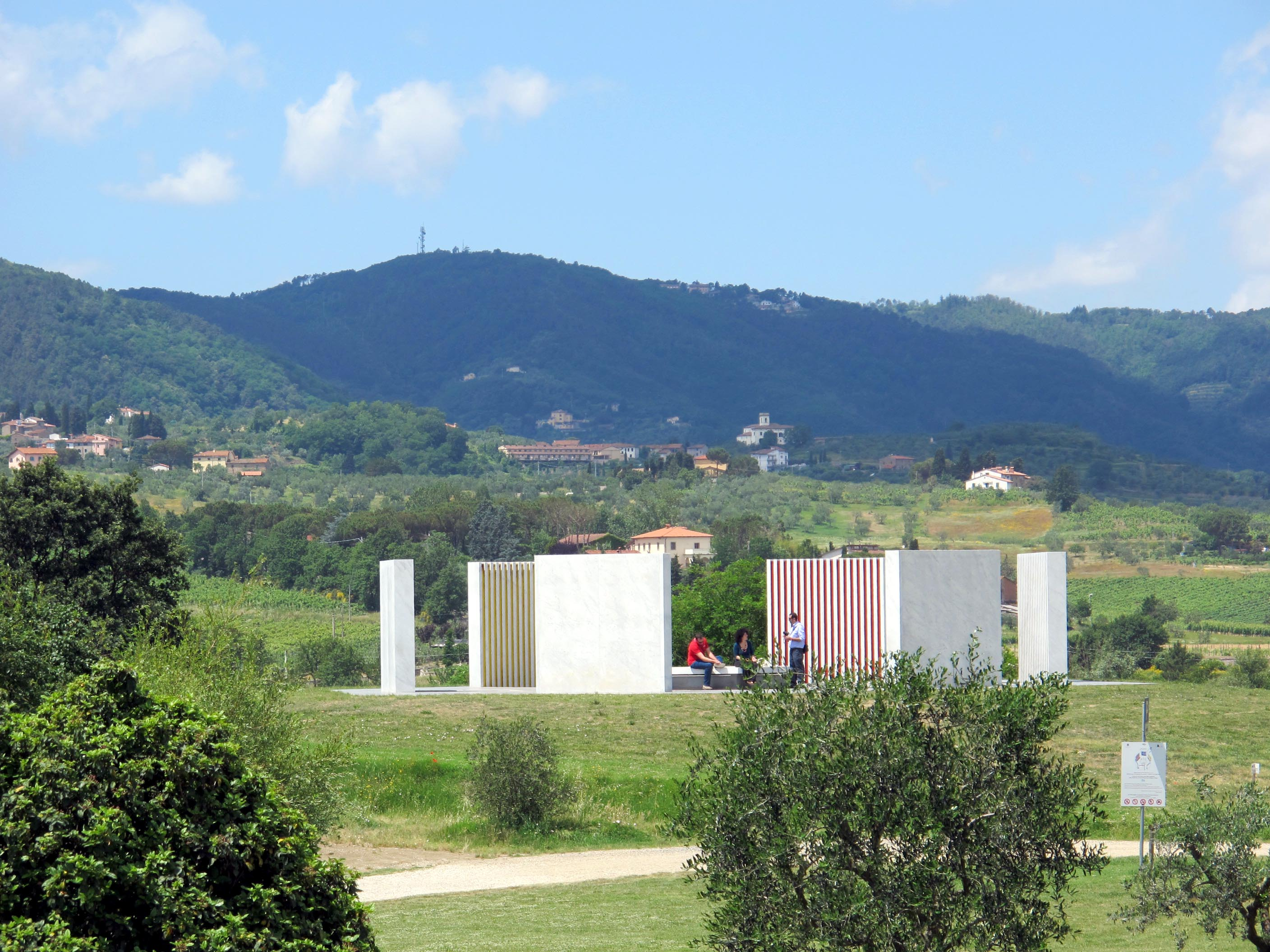 Villa la magia, parco